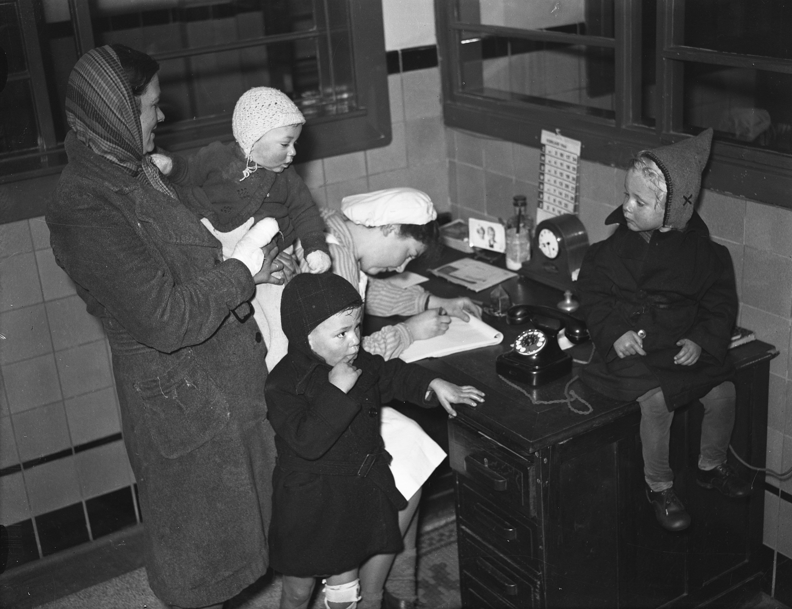 Collectie / Archief : Fotocollectie Anefo Reportage / Serie : [ onbekend ] Beschrijving : Kinderbewaarplaats Wongerdweg Datum : 4 februari 1946 Fotograaf : Sagers, Harry / Anefo Auteursrechthebbende : Nationaal Archief Materiaalsoort : Glasnegatief Nummer archiefinventaris : bekijk toegang 2.24.01.09 Bestanddeelnummer : 901-4349